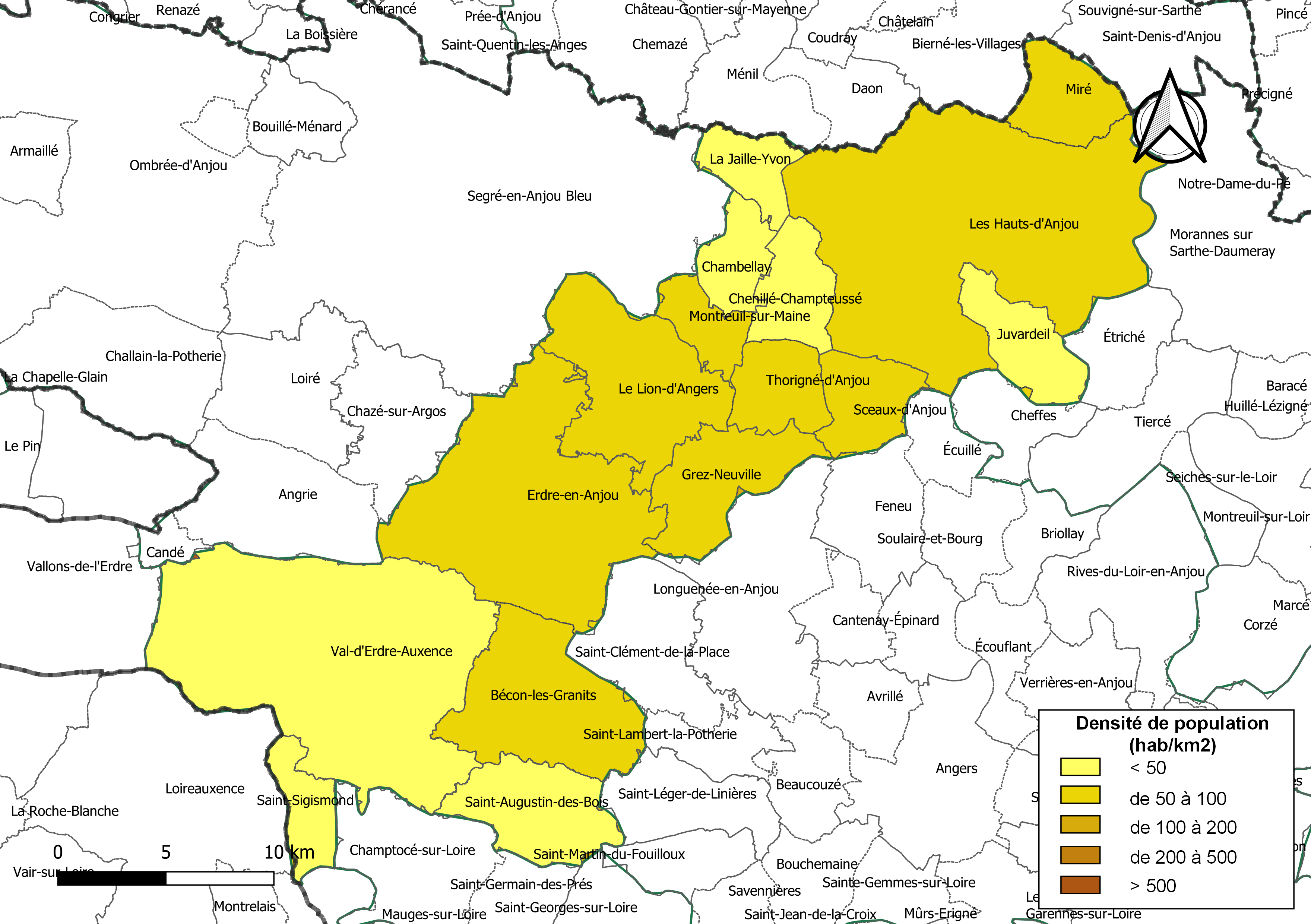 Carte des densités de population (millésimée 2016) des communes de la Communauté de communes des Vallées du Haut-Anjou, département de Maine-et-Loire, France. Composition au 1er janvier 2019.